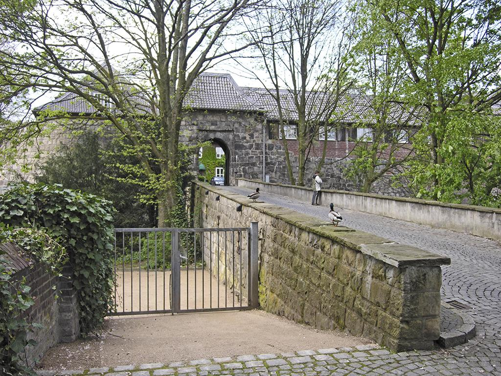 "Burgtor", Dinslaken